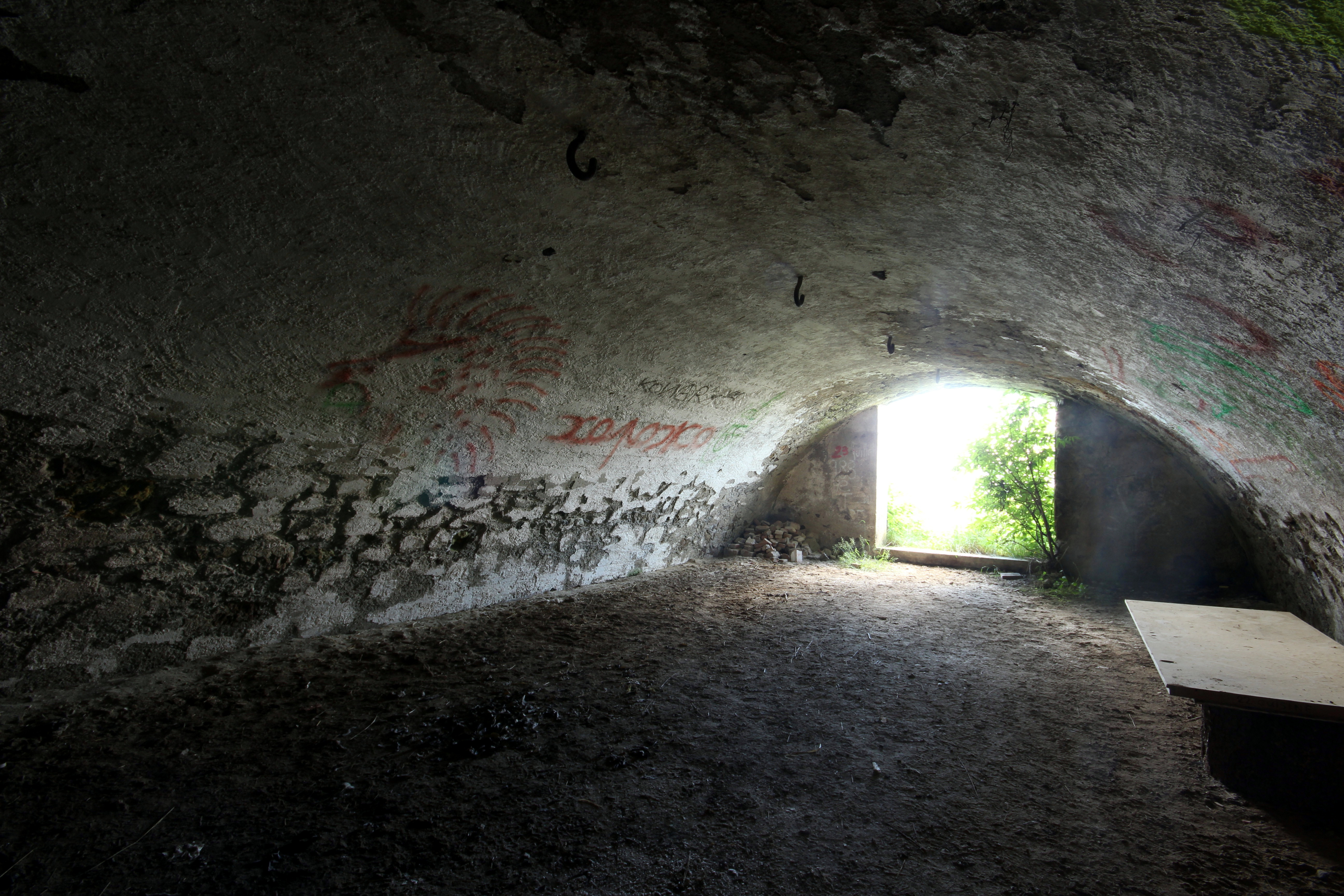 L'intérieur du traverse du fort de Montgilbert